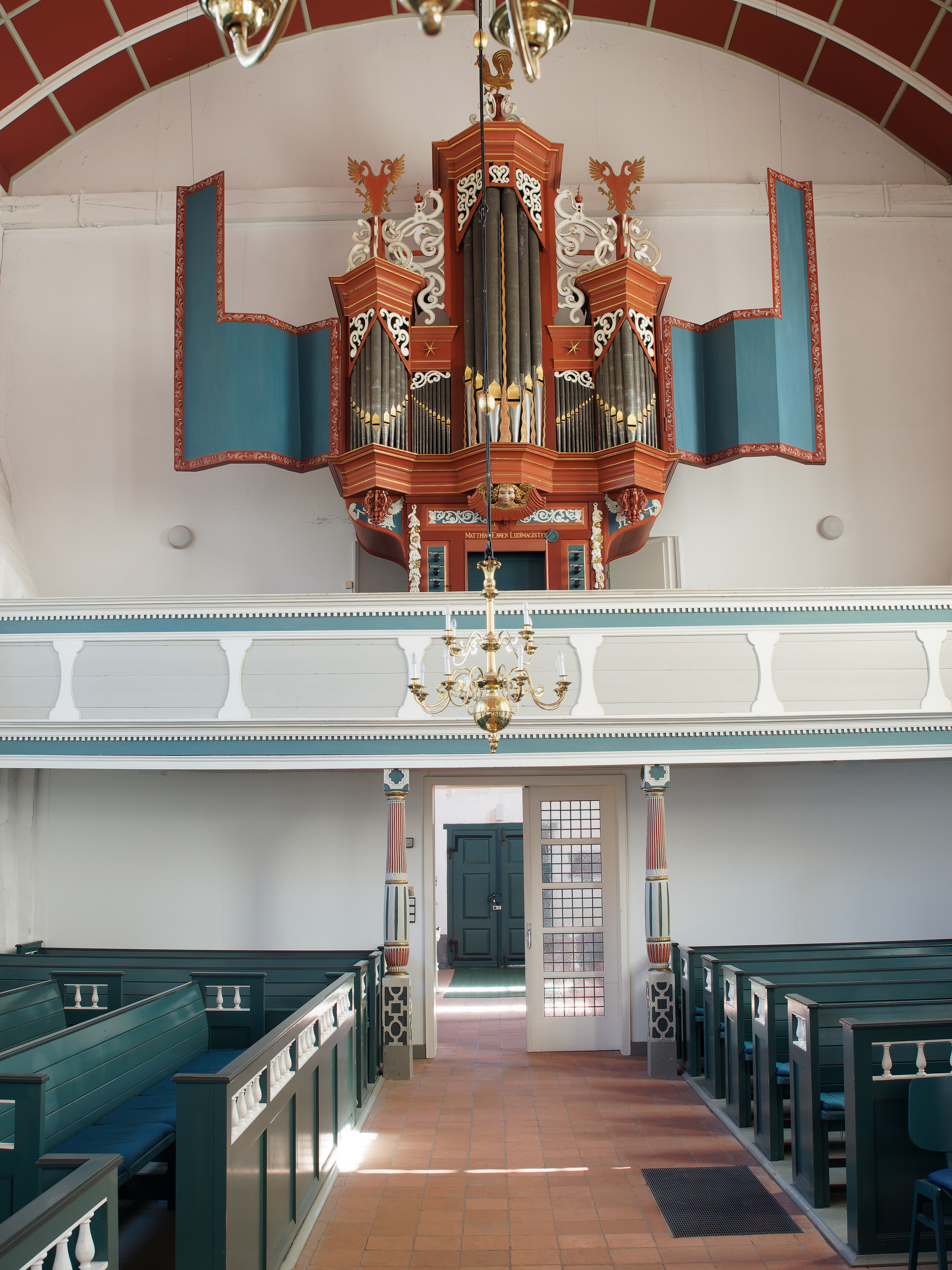 Vorraum mit Eingangstür, Empore und Orgel in der ev. reformierten Kirche in Uttum (Ostfriesland).